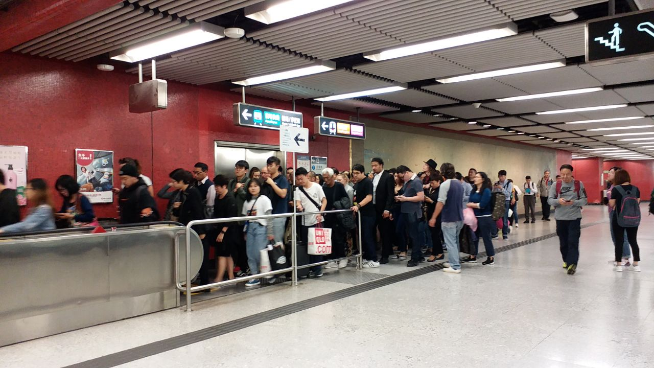 中文（香港）: 港鐵中環站列車相撞事故期間，中環站L4層4號月台的人潮。